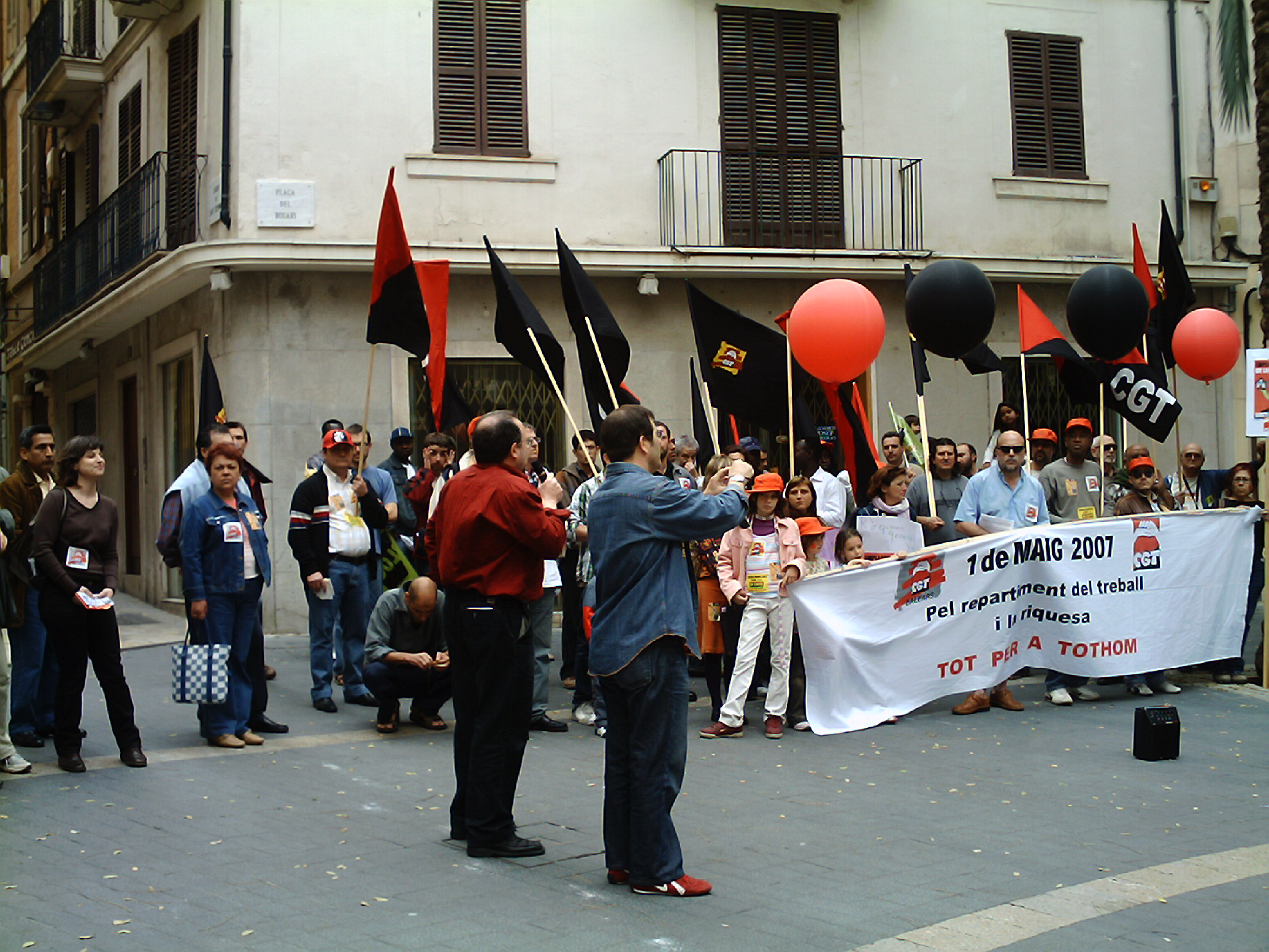 Discurs del 1er de Maig 2007 a la pl. del Rosari.